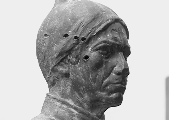 busto santo salazar